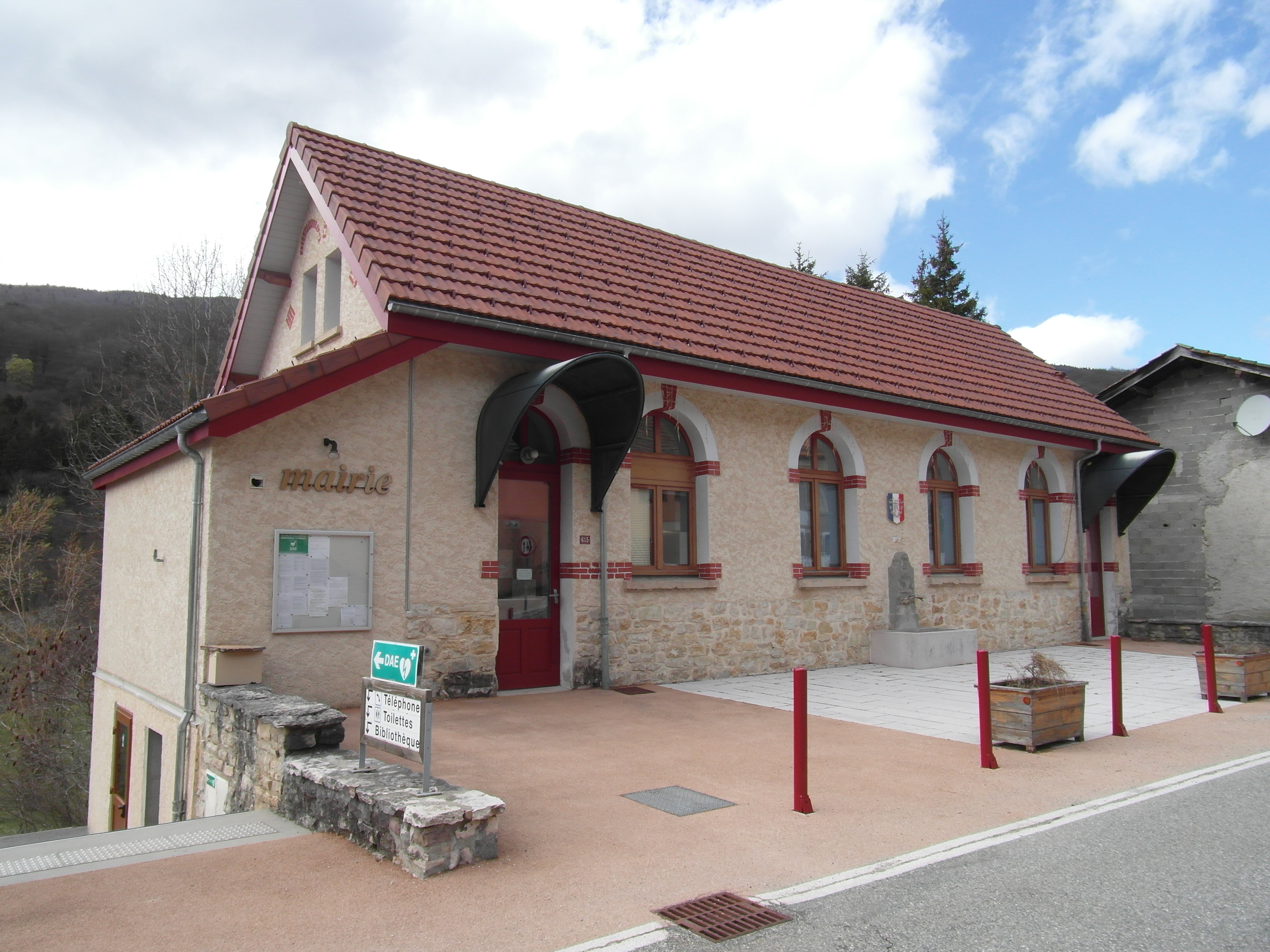 Mairie de église de Rencurel